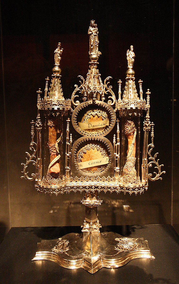 Sonderausstellung „Gold vor Schwarz“ auf Zollverein, Exponate der Essener Domschatzkammer in der ehemaligen Kohlewäscherei. Cosmas-Damian-Reliquiar